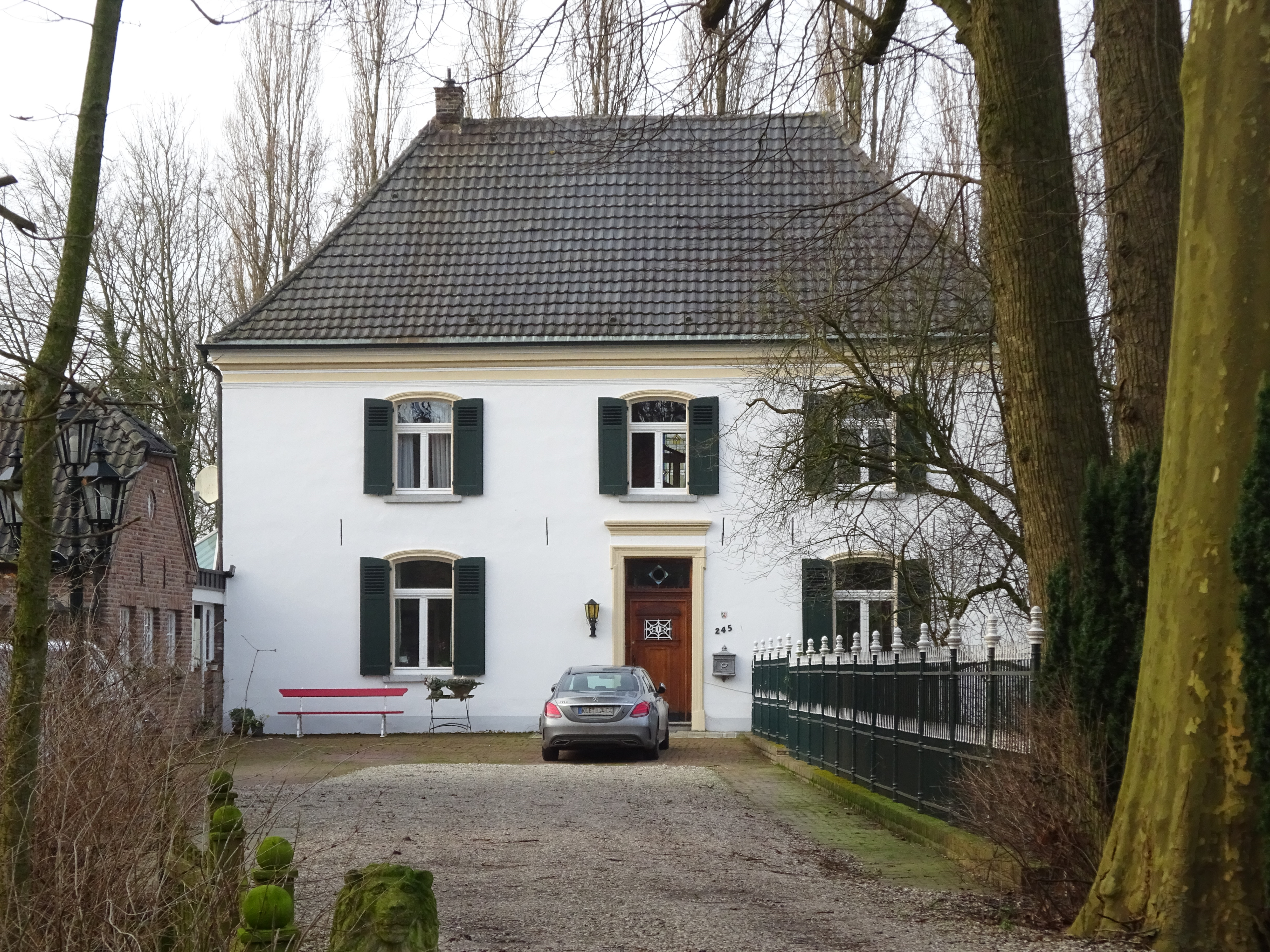 Kalkar-Wisselward Griether Straße (Baudenkmal Griether Straße 245) Haus Wardenstein